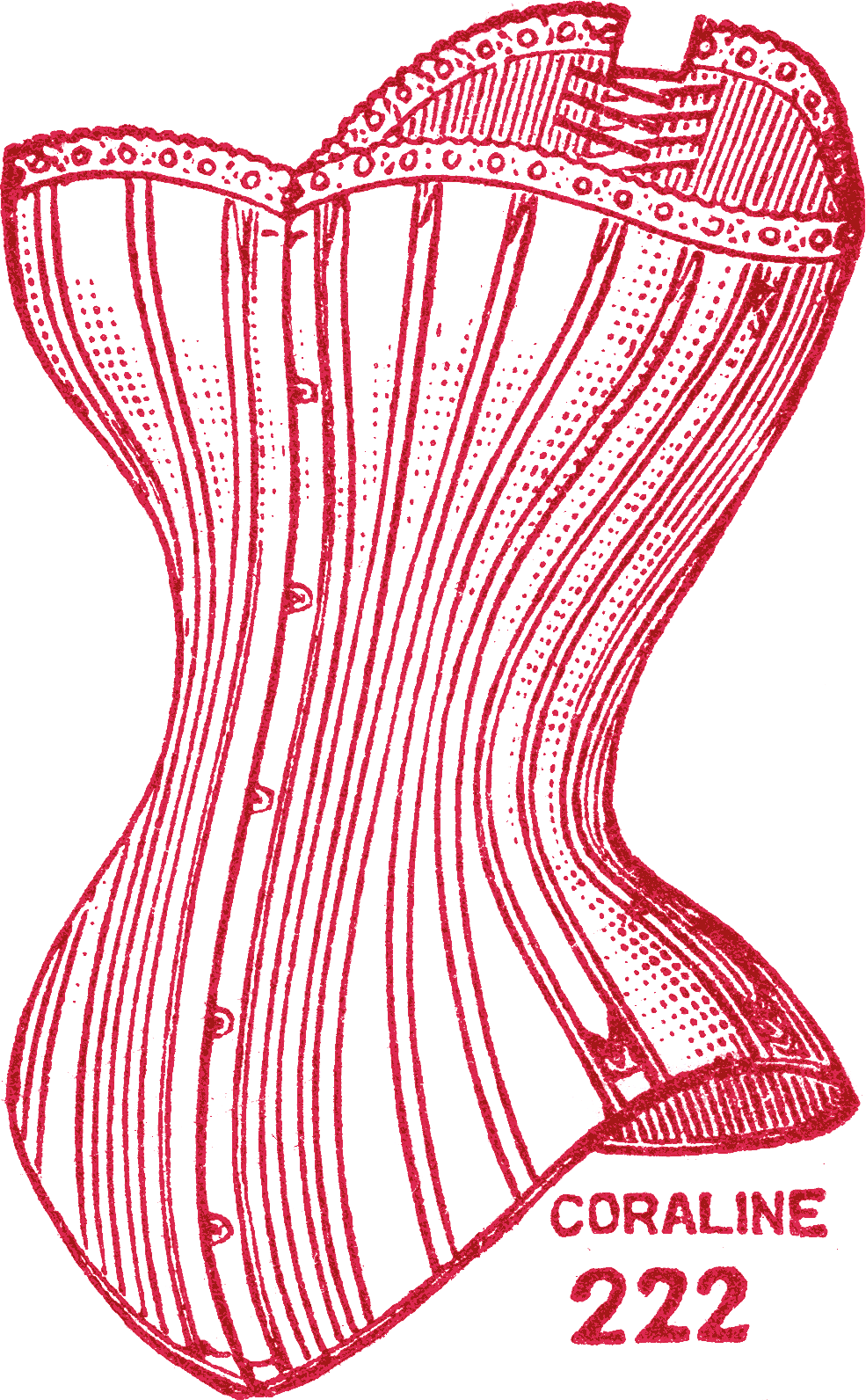 Coraline222 in 1895